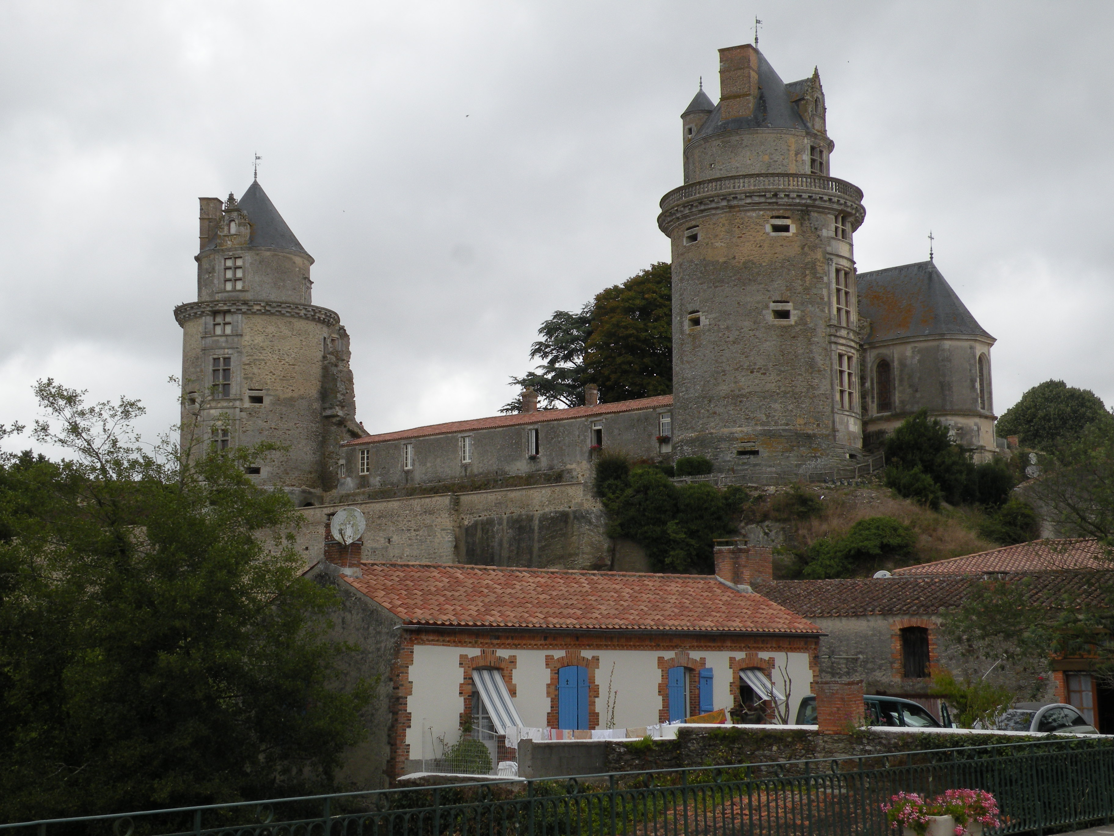 chateau d'Apremont (Vendée)